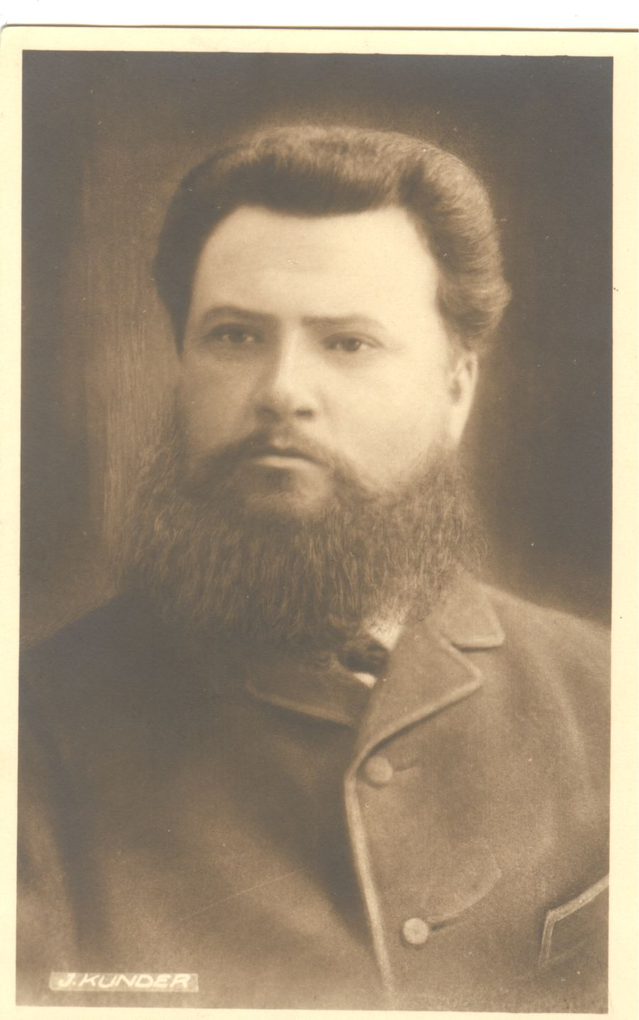 MuuseumikoguFotokogu OlemusfotoOriginaaloriginaalSäilivushea